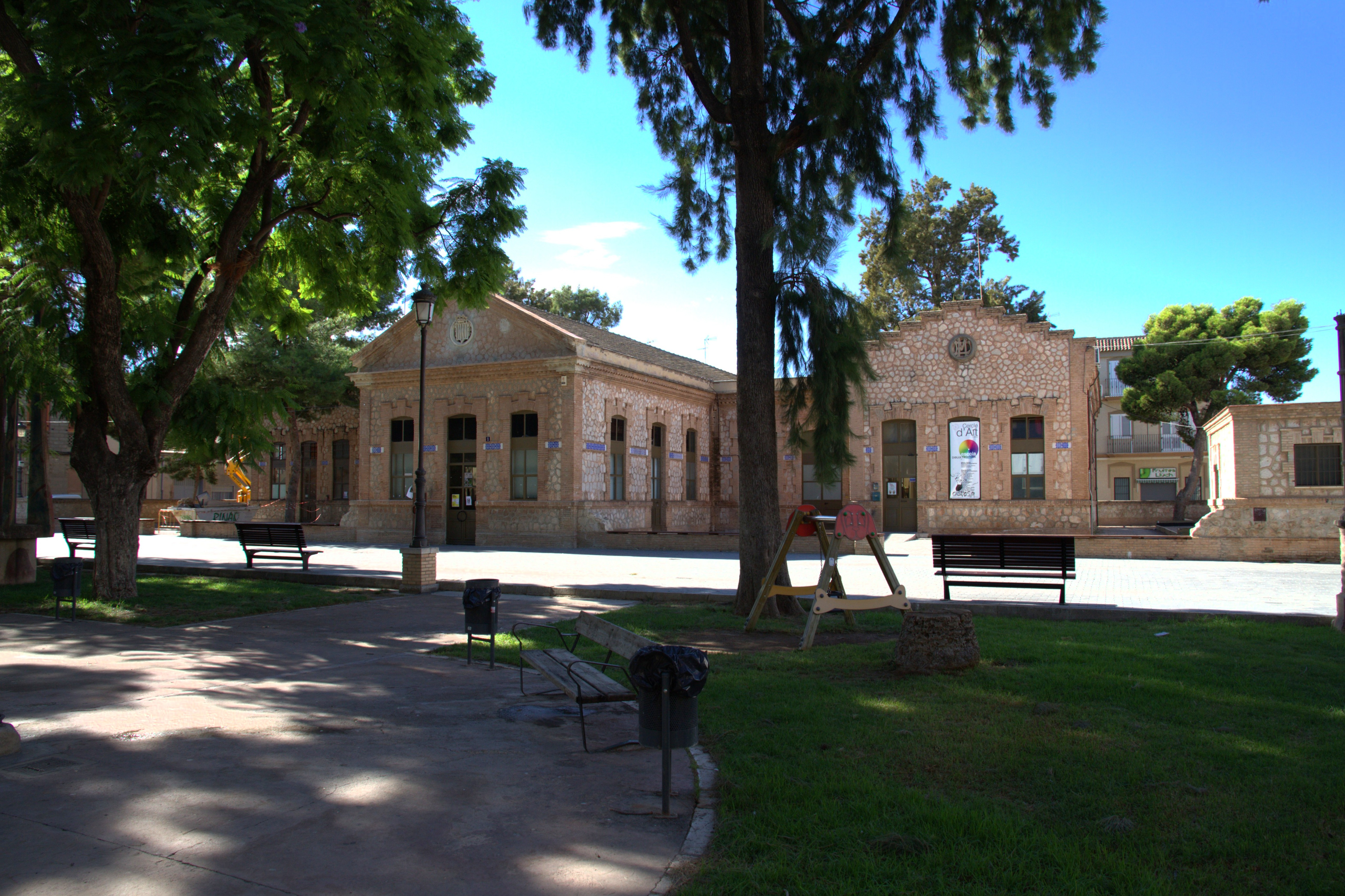 Escoles municipals 13.126-004.